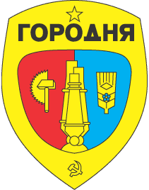 герб Городні часів СРСР Soviet era coats of arms of Horodnia, a city in Chernihiv Oblast (province) of Ukraine.